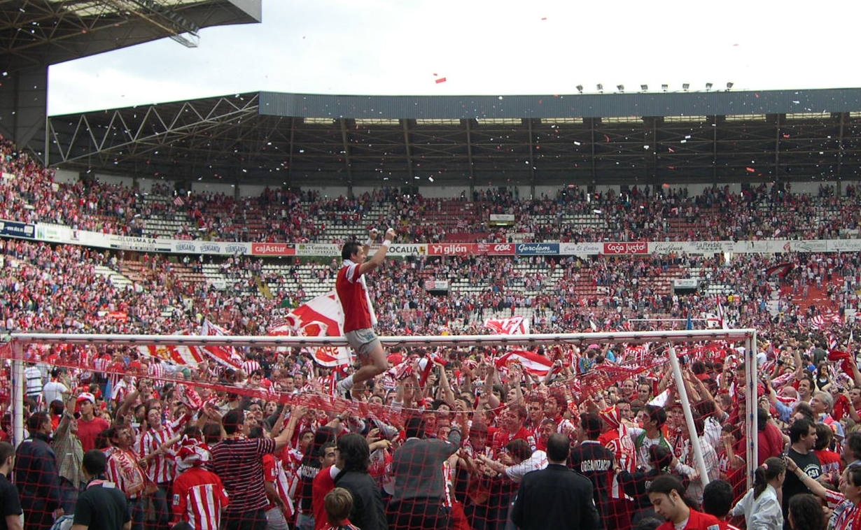 El sporting de Xixón, el día de la so xubida a primera división